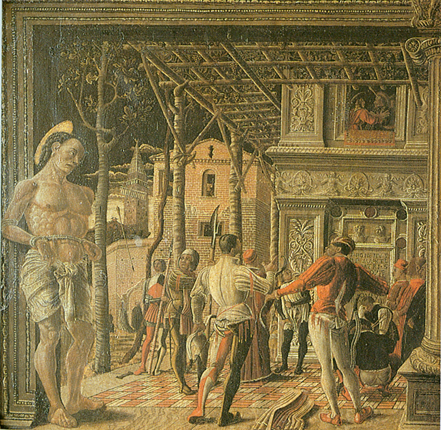 copy